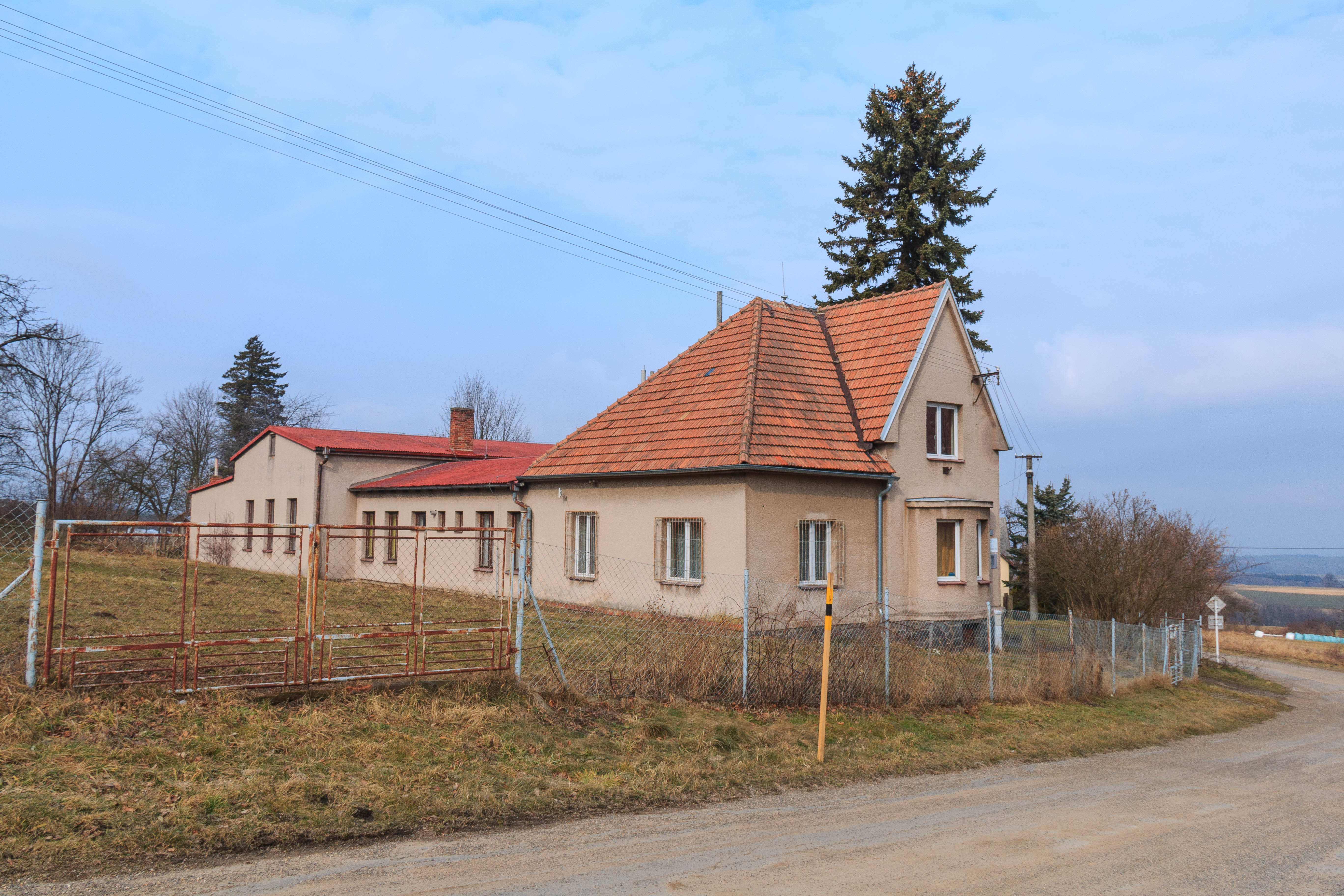 Ctětín obecní úřad